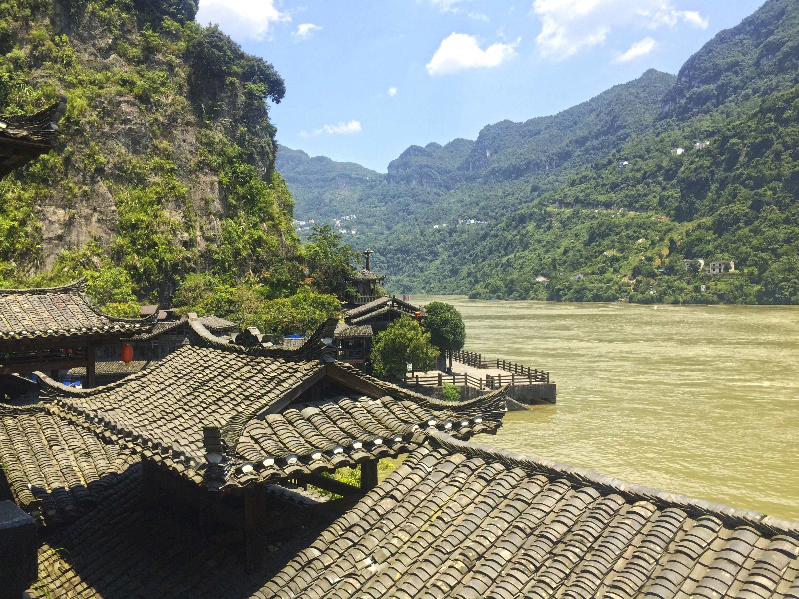 Beijing, 31 julio 2017 (Andes).- Ataúdes colgando de la montaña, un riachuelo azul en medio de la selva, monos salvajes, rituales ancestrales para recibir a los barcos, entre otras cosas, son parte de los atractivos turísticos de la Tribu de las Tres Gargantas, un área natural a las orillas del río Yangtzé, en el sureste de China. Por su riqueza natural el sector ha sido catalogado como un “Centro de Protección de la Cultura Popular y Arte de las Tres Gargantas” y se ha convertido en uno de los cinco principales atractivos de la ciudad de Yichang, en la provincia de Hubei, y cada año recibe a miles de turistas, principalmente del interior del país. ANDES/Lizette Abril. This file comes from the Flickr stream of the Public News Agency of Ecuador and South America and is copyrighted.This file is verified as being licenced under an appropriate Creative Commons licence.In short: you are free to modify the file as long as you attribute Photographer name/Andes and distribute it under the same licence. This tag does not indicate the copyright status of the attached work. A normal copyright tag is still required. See Commons:Licensing.